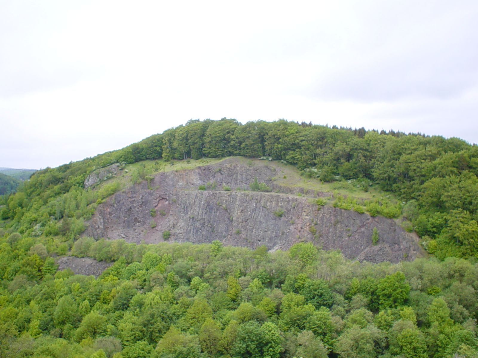 Naturschutzgebiet Südlicher Arnstein von Süden.